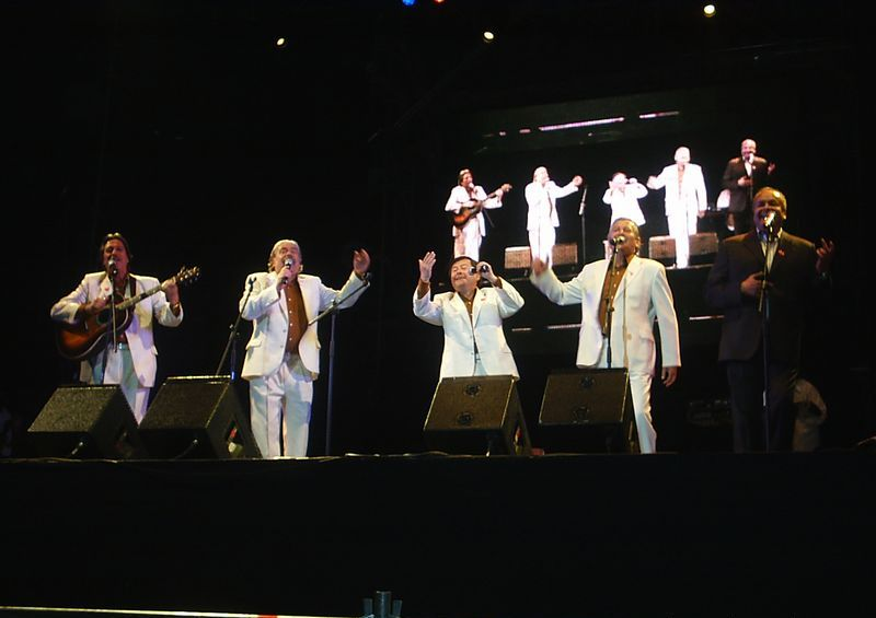 Pujillay junto a Álvaro Salas, durante la Gira Teletón 2007.